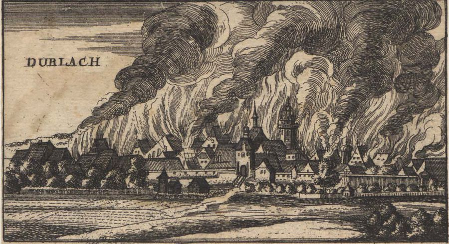 Brand von Durlach 1689 während des Pfälzischen Erbfolgekrieges